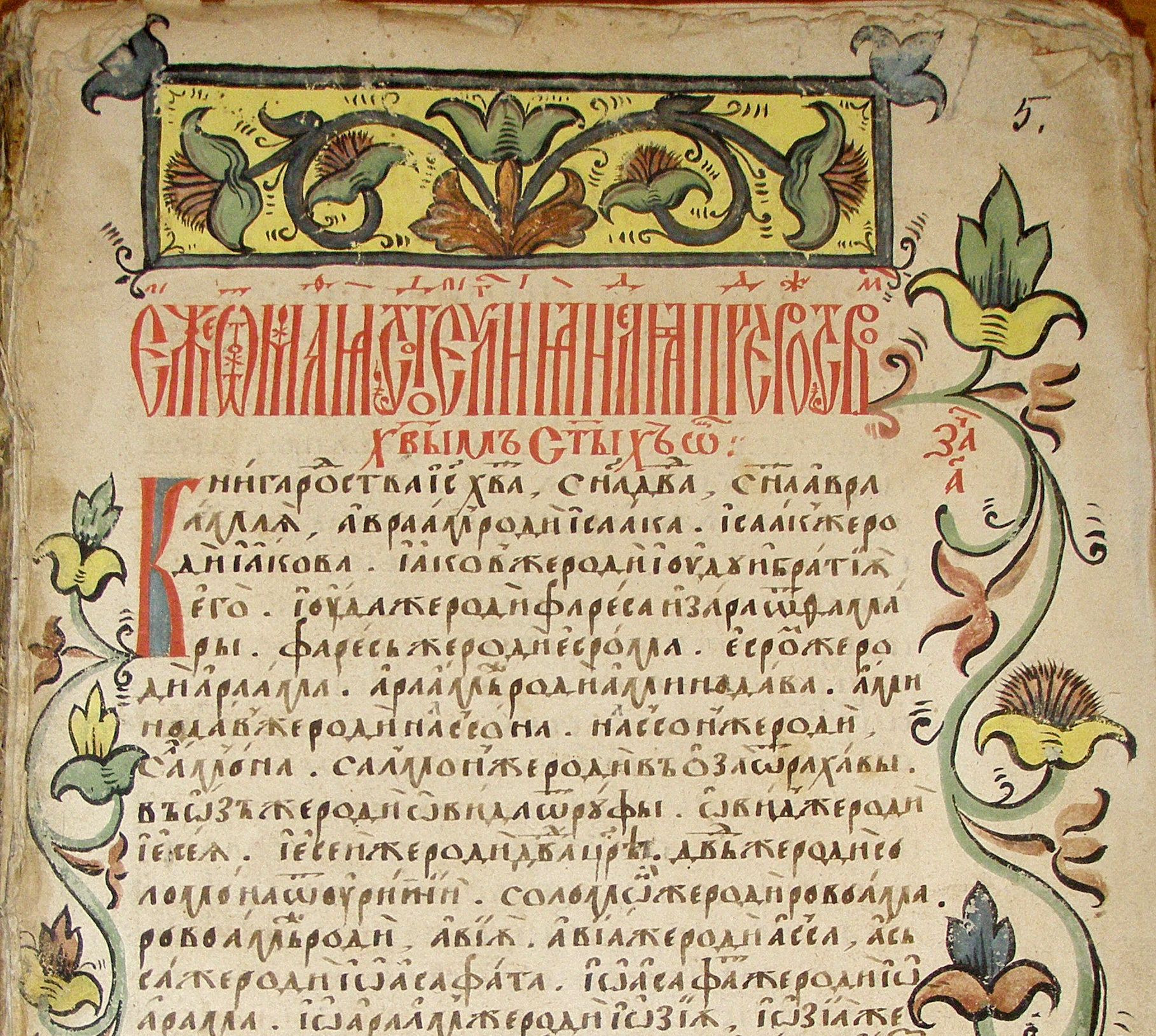 S.5_(fr)_Evangelium_1603.jpg: Фрагмент сторінки Напр. Євангеліє 1603 р.